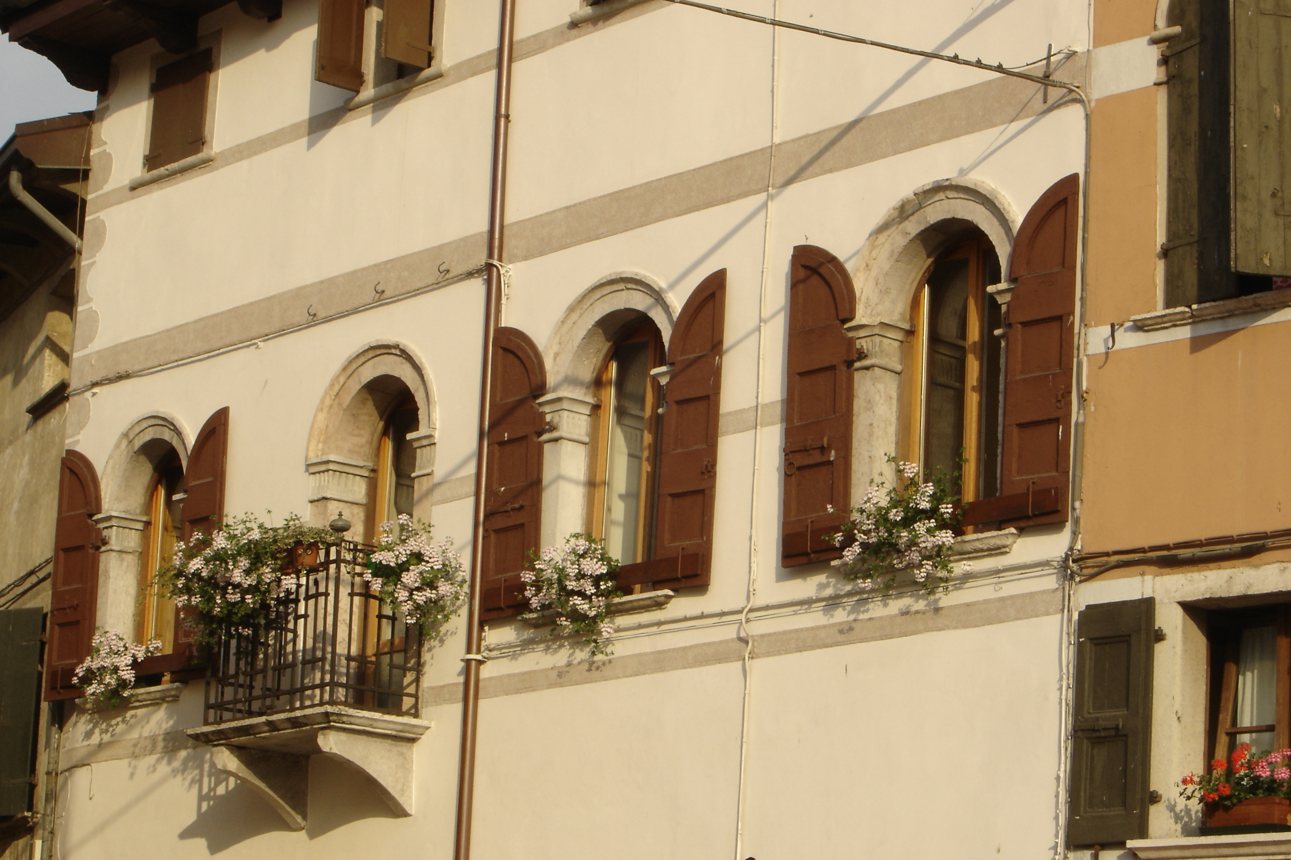 foto scattata da Jacobus